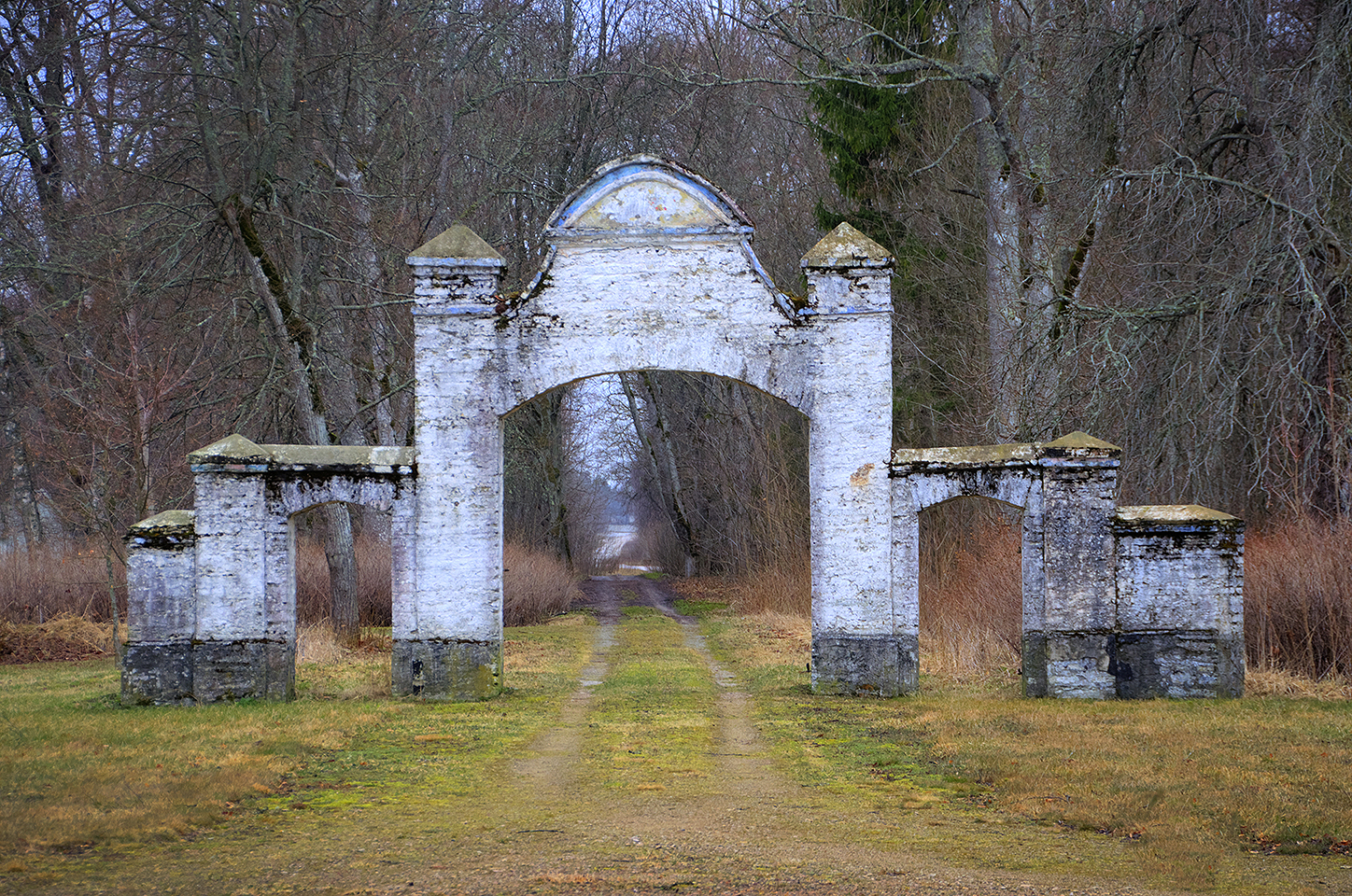 Leetse manour